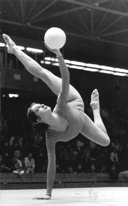 Susanne Ebert ADN-ZB MTI-11.11.78 Madrid: Grazie und Kraft vereint auf dem Foto von Susanne Ebert (SC Chemie Halle) bei der Übung mit dem Ball. Sie gehört neben Sabine Ploetz (SC Leipzig) zum Aufgebot des Deutschen Turn-Verbandes der DDR bei den 1. Europameisterschaften in der Leistungsgymnastik in Madrid. (Foto von einem früheren Wettkampf - v. Turn- und Sporttag des DTSB 1974)